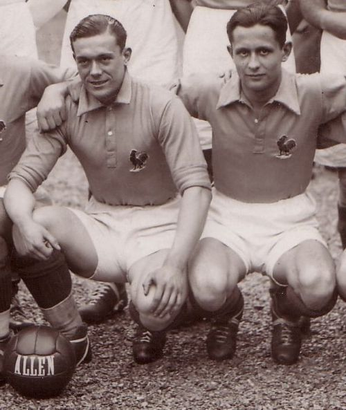 Jean Nicolas et Roger Rio sous le maillot de l'équipe de France de football en 1934.